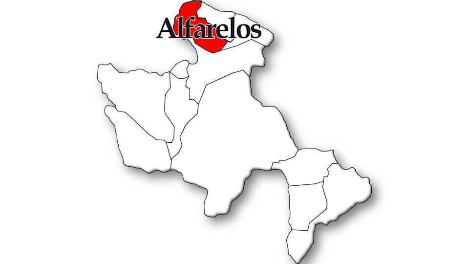 População